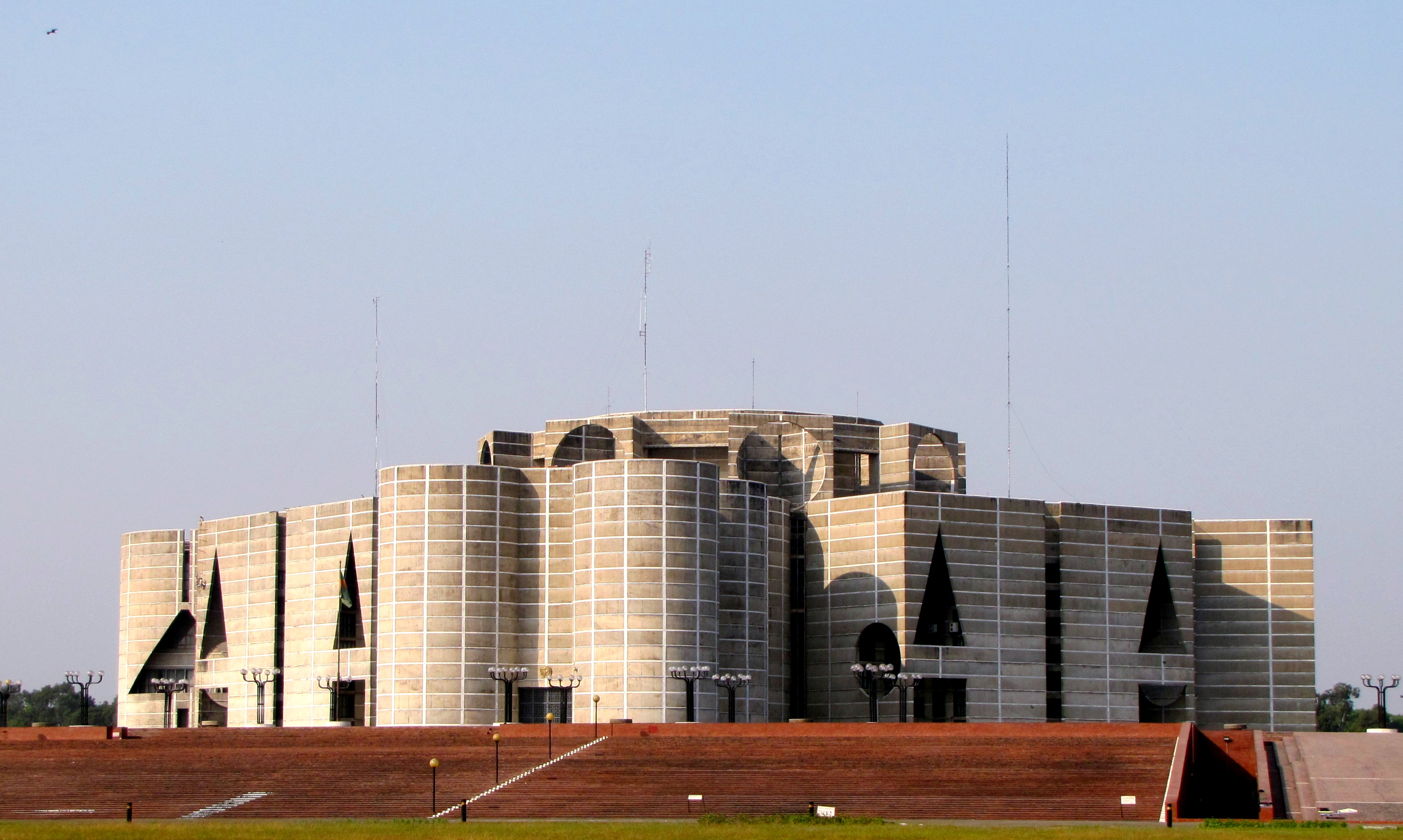 জাতীয় সংসদ ভবন